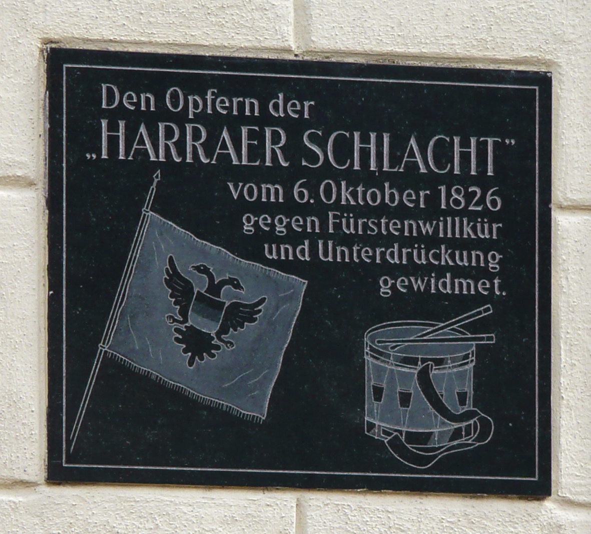 Gedenktafel an die Harraer Schlacht am 06. Oktober 1826 an einem Haus auf dem Dorfplatz in Harra.